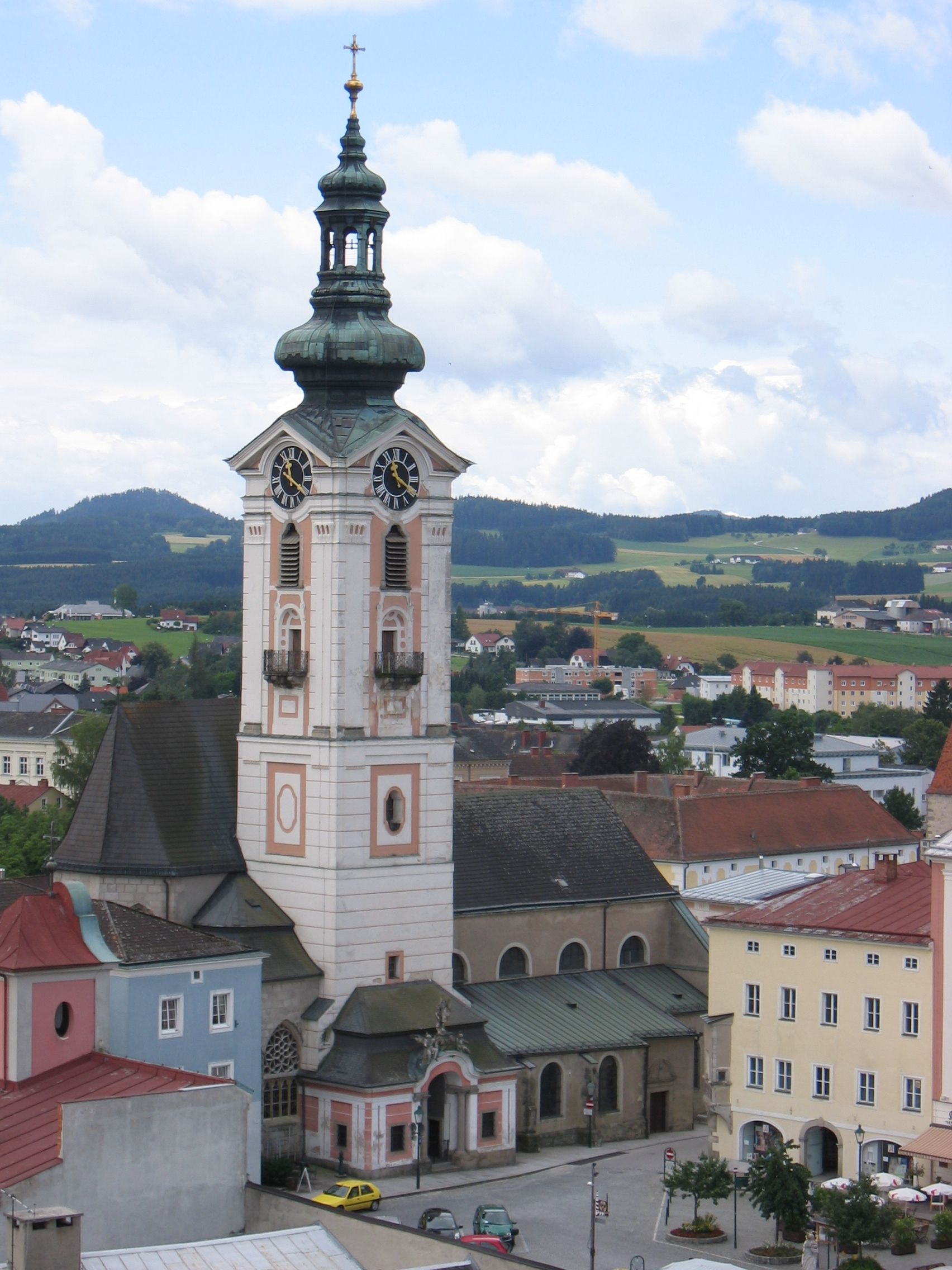 Kirchturm der Stadtpfarrkirche vom Bergfried gesehen